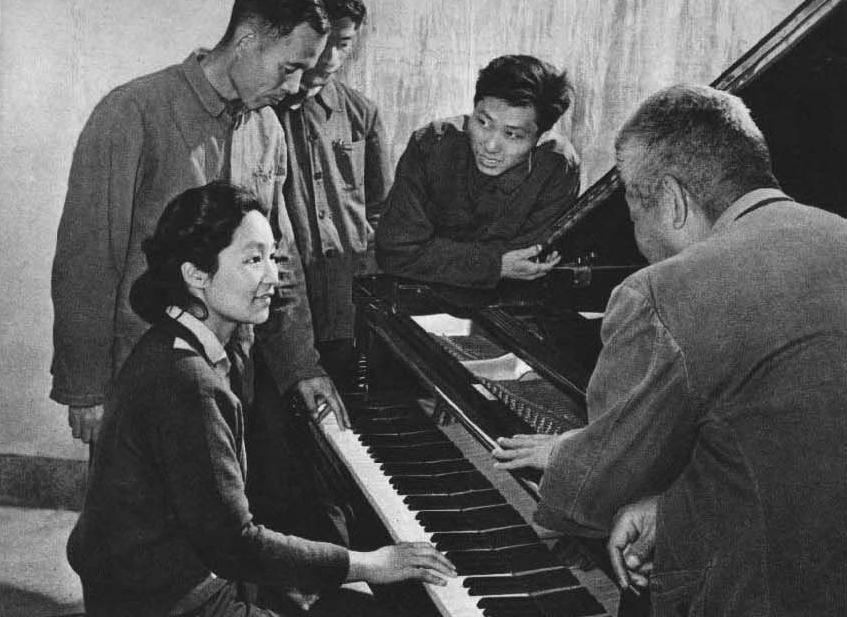 周广仁，中华人民共和国钢琴家。图中她正在鉴定产品。